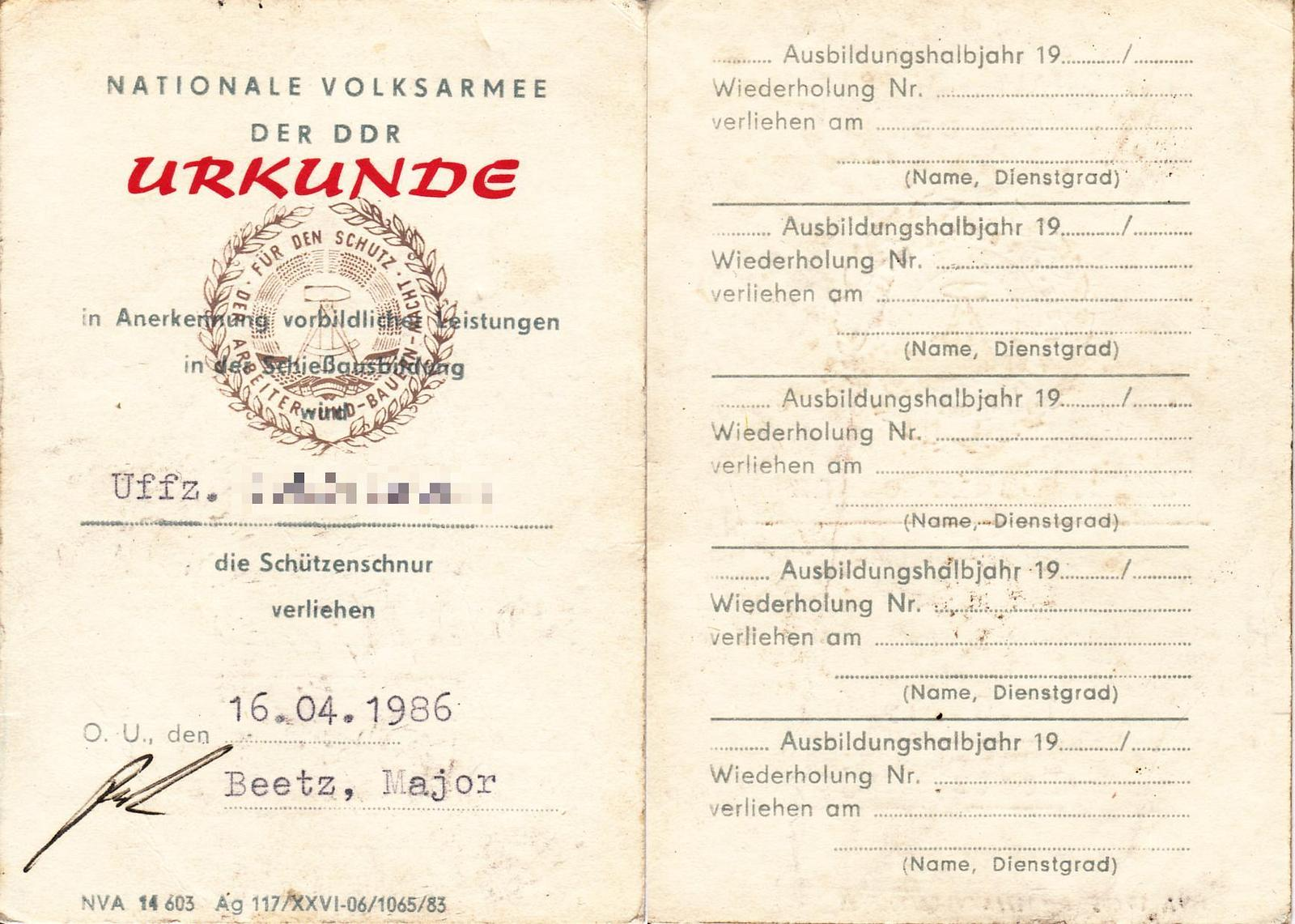 Schützenschnur-Urkunde der NVA von 1986, Vorder-und Rückseite. Originalgröße A7 (74 x 105 mm).